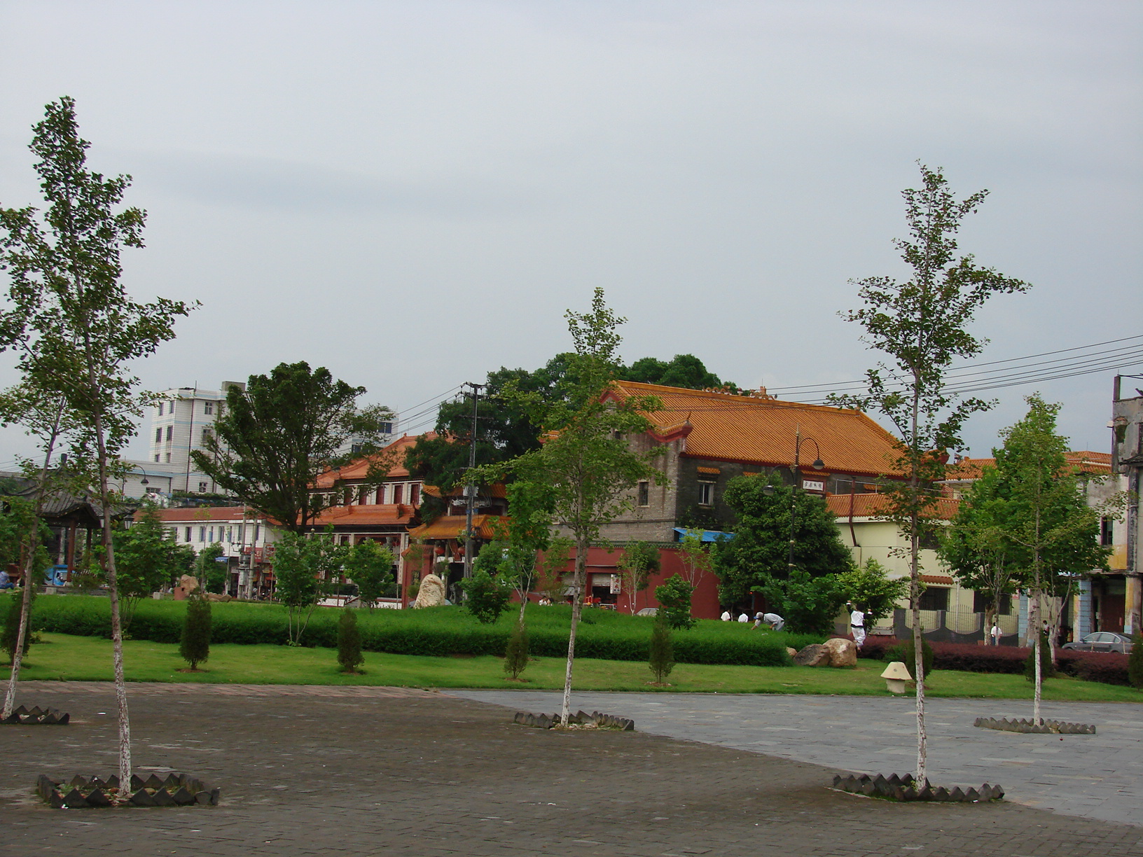 赣州寿量寺